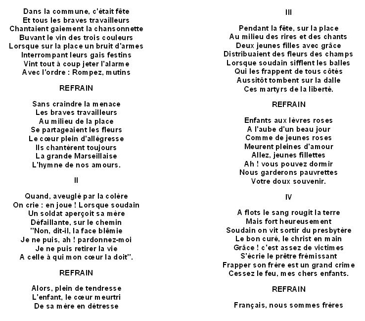 La chanson des fusillés de Fourmies (1891)